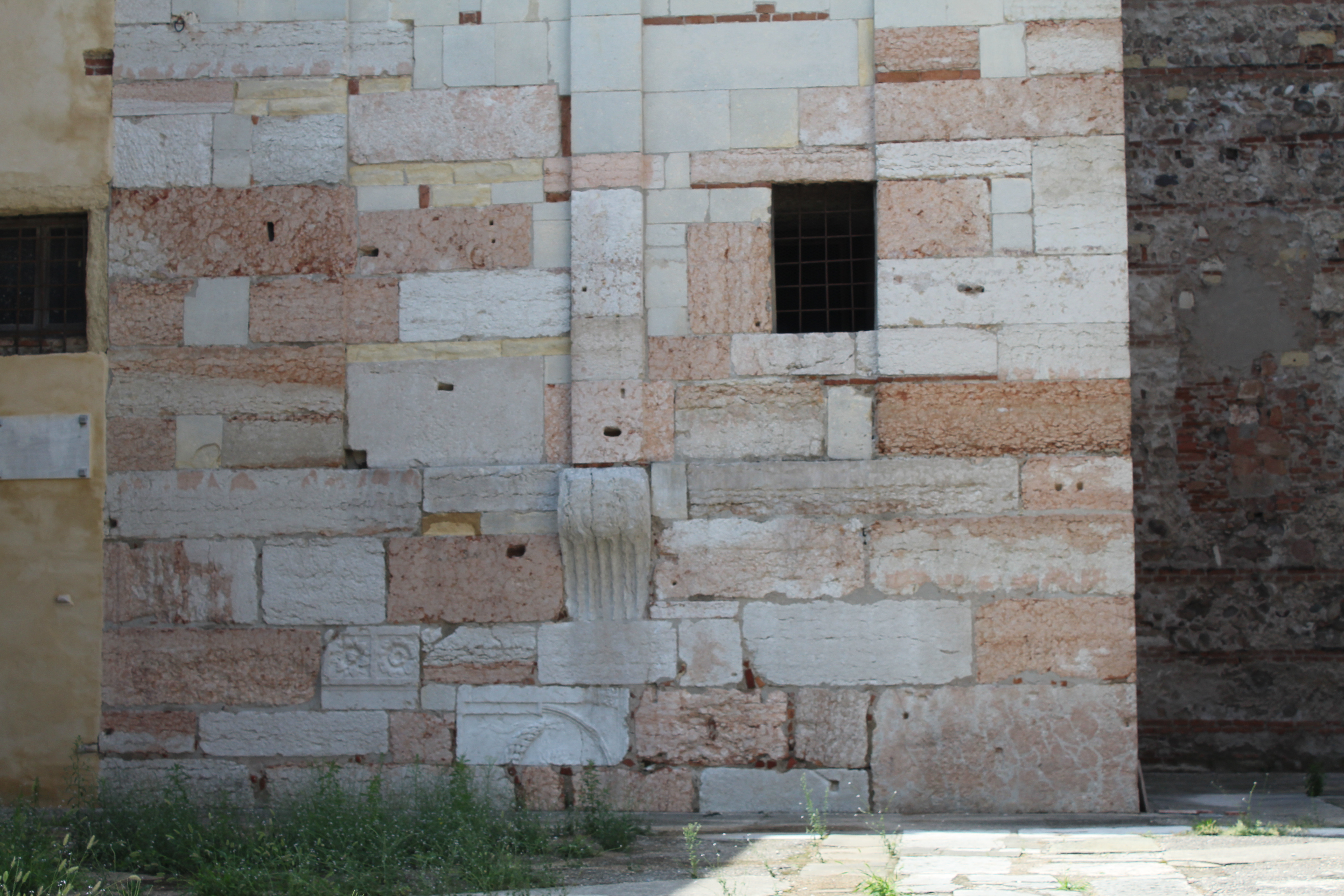 Base del campanile della chiesa della Santissima Trintà in Monte Oliveto a Verona. Si notino le pietre di recupero utilizzate nel muro provenienti da una necropoli romana